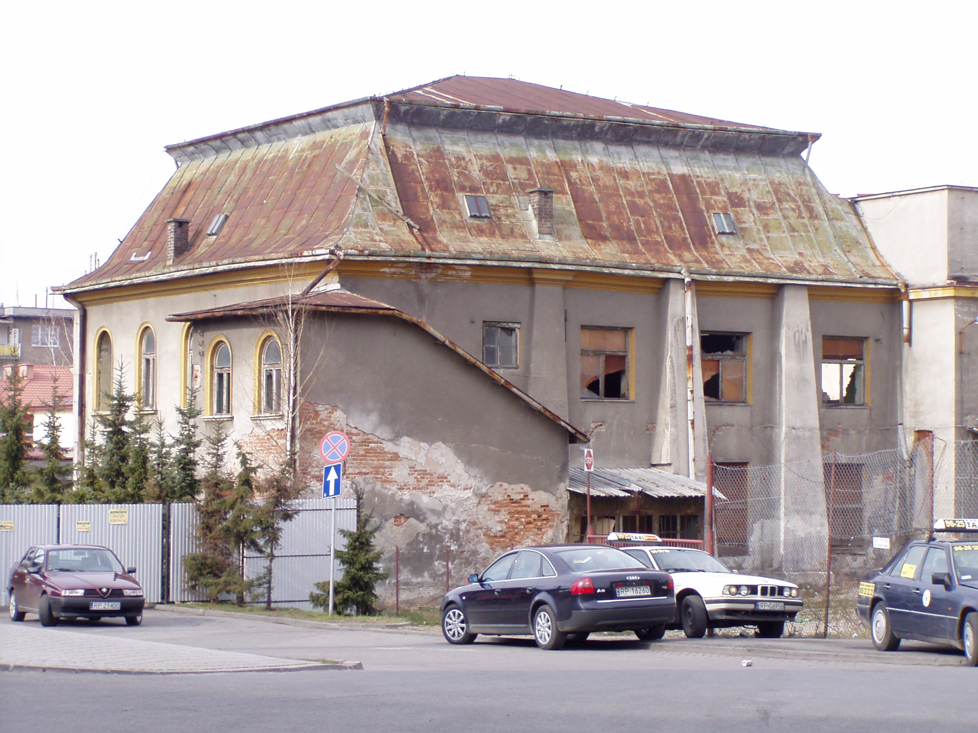 Synagoga.